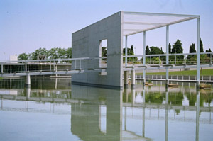 Parque da cidade - Beja Fotografia de: João Espinho Data: Janeiro de 2007